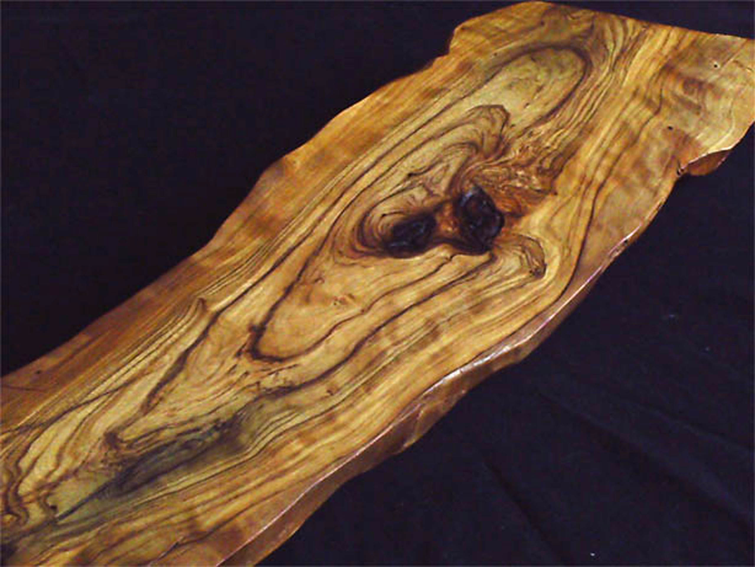 planchette en olivier